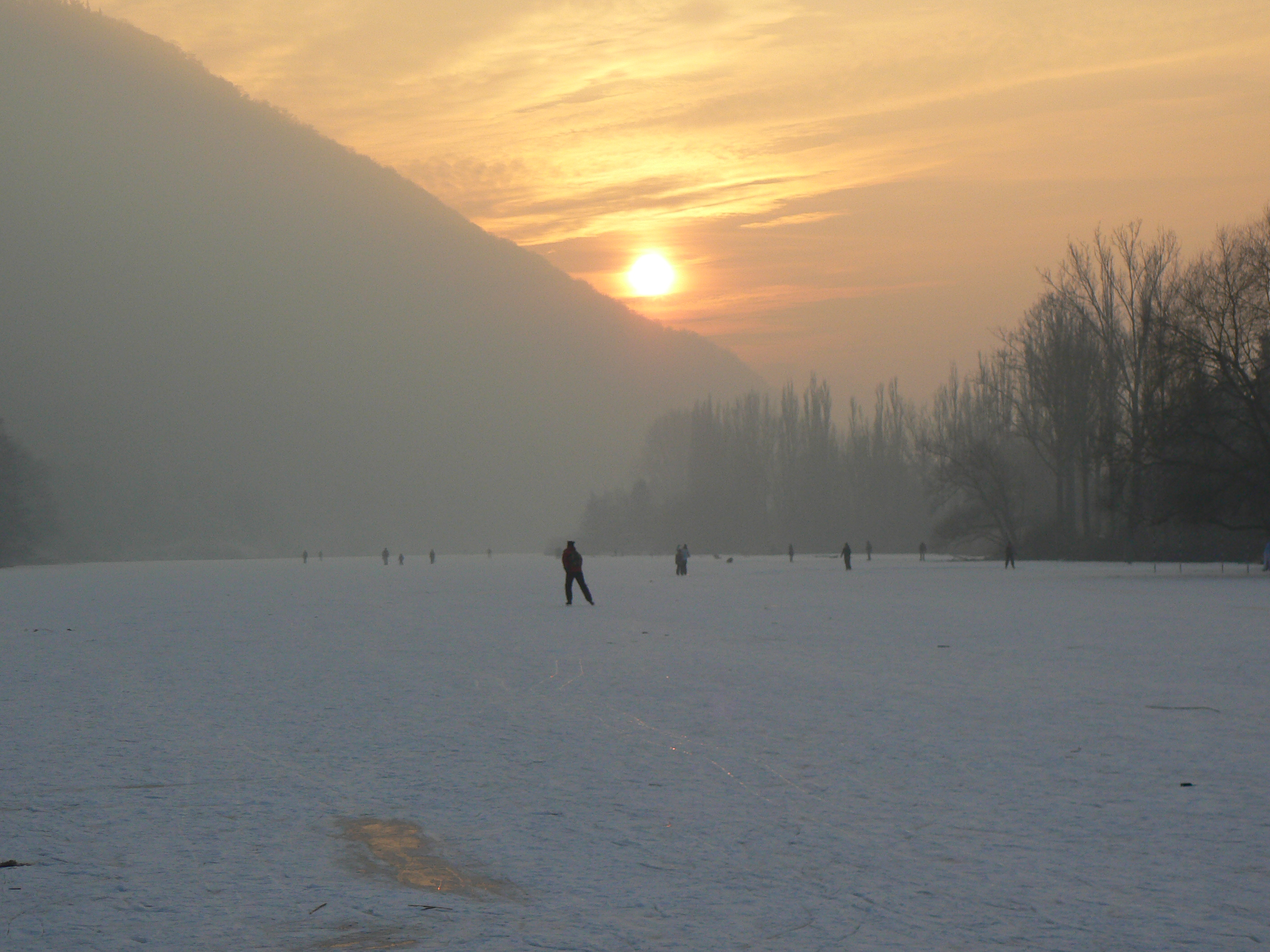 Zugefrorener Stausee Niederhausen im Winter, Bereich im Naturschutzgebiet „Nahetal von Boos bis Niederhausen“